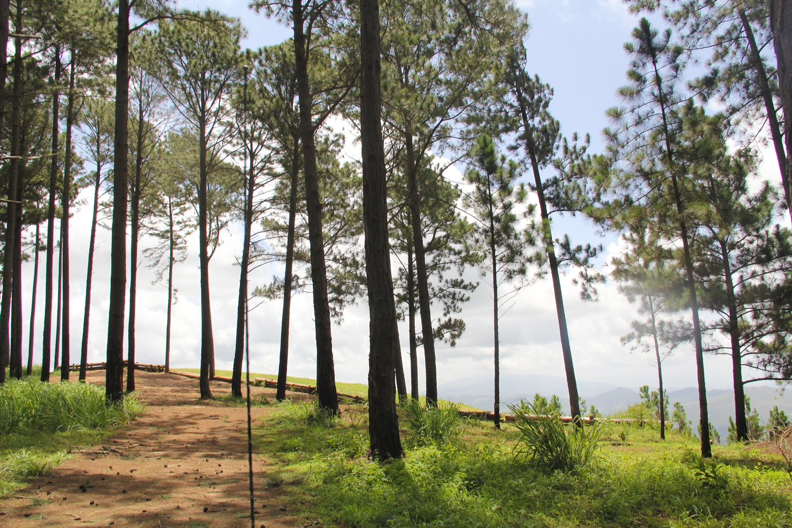 Entrada a Pista de Parapente en una montaña repleta de pinos caribe en Nirgua Estado Yaracuy